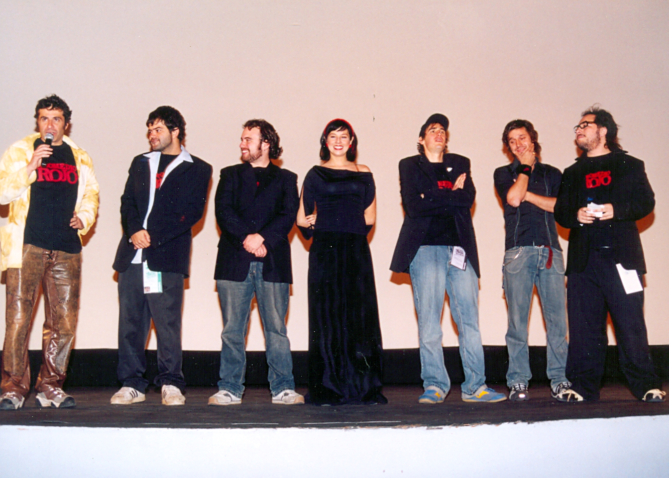 Fernando Larraín, Benjamín Vicuña, Nicolas López, entre otros; Película Promedio Rojo; año 2004